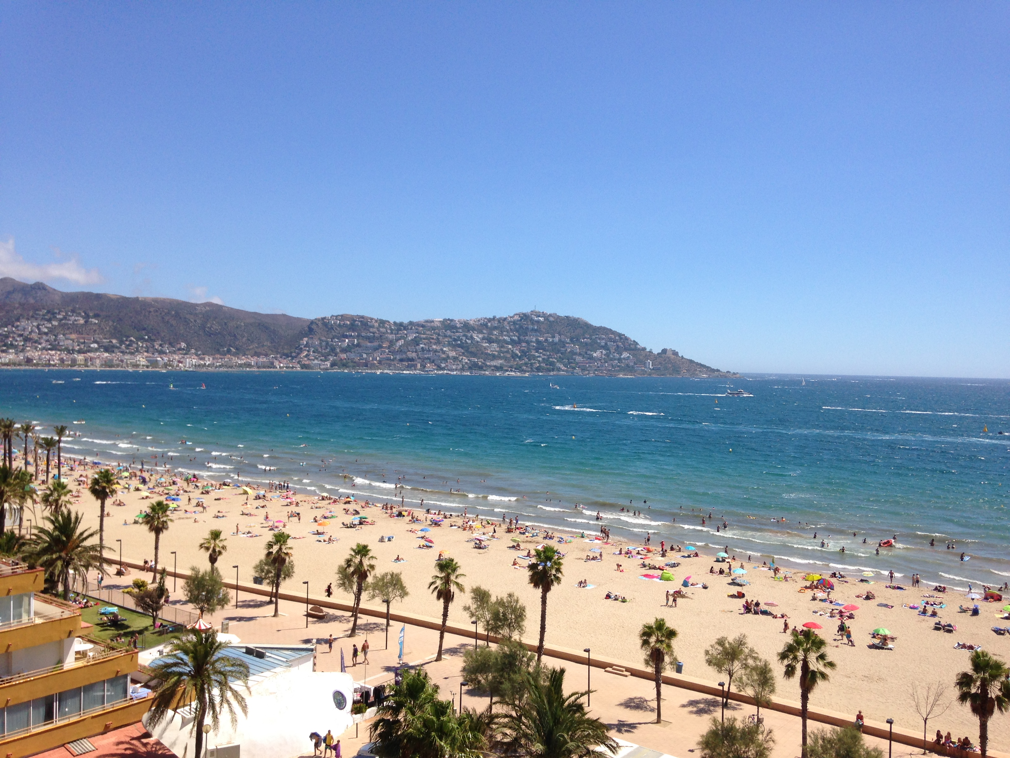 Vista parcial de Roses en Girona, Catalunya (España)